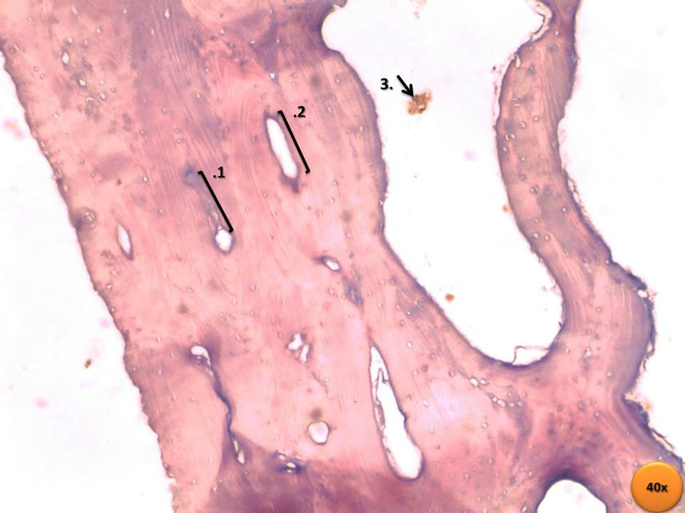 Osso por Descalcificação – HE – 40x Legenda: 1.Canal de Volkmann 2.Canal de Havers 3.Vaso Sanguíneo